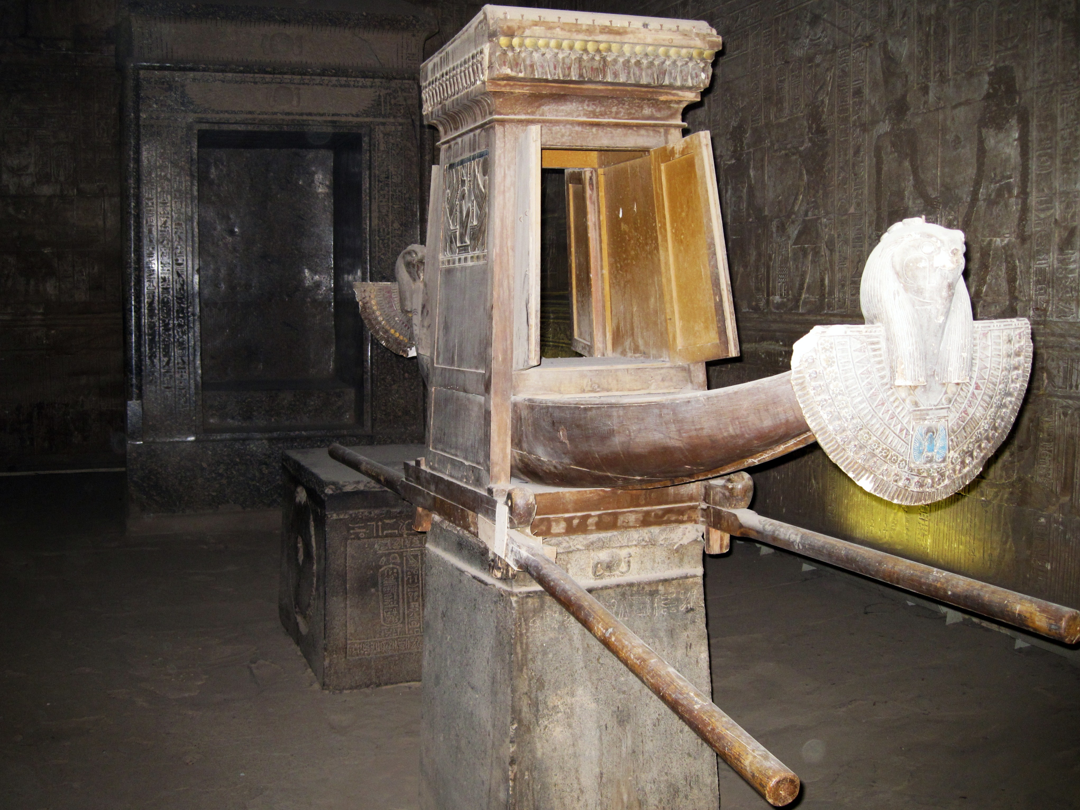 Heilige Barke (Sonnenschiff) im Tempel von Edfu, Ägypten